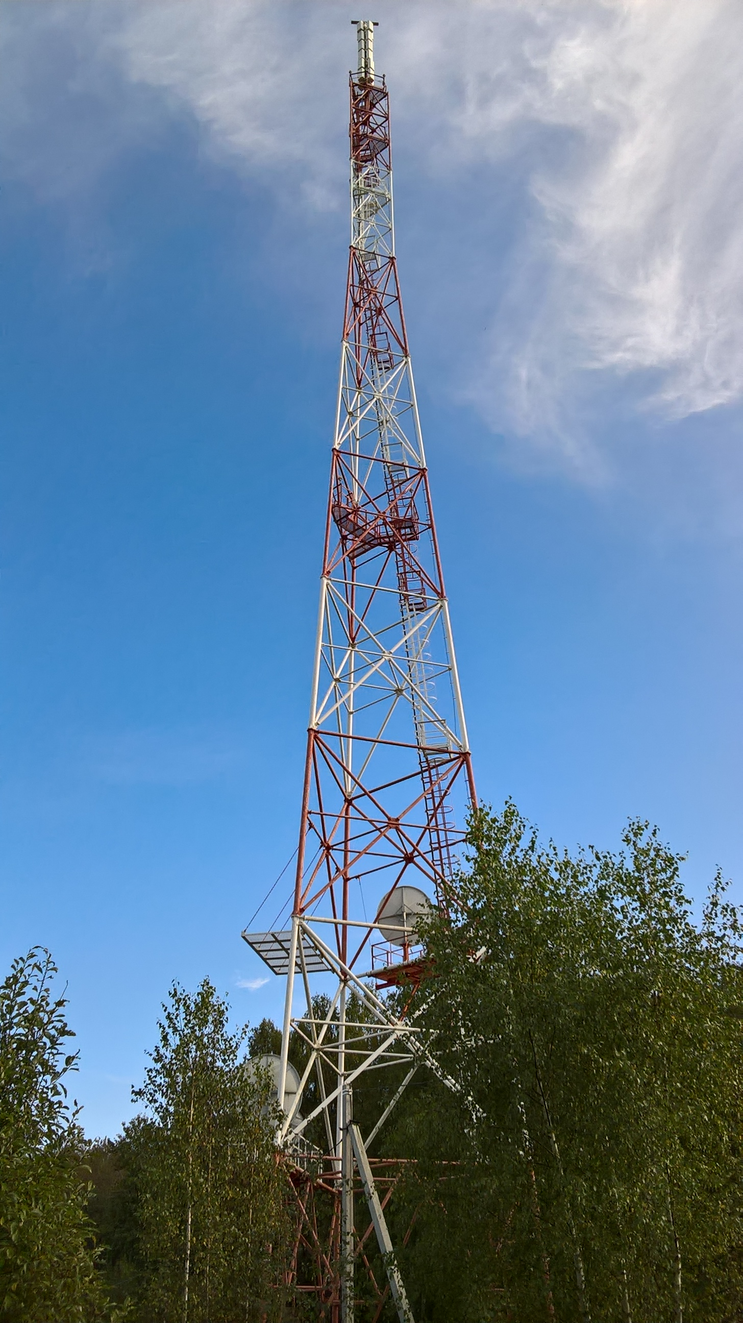 Башня сети цифрового эфирного (наземного) телерадиовещания ФГУП "РТРС"